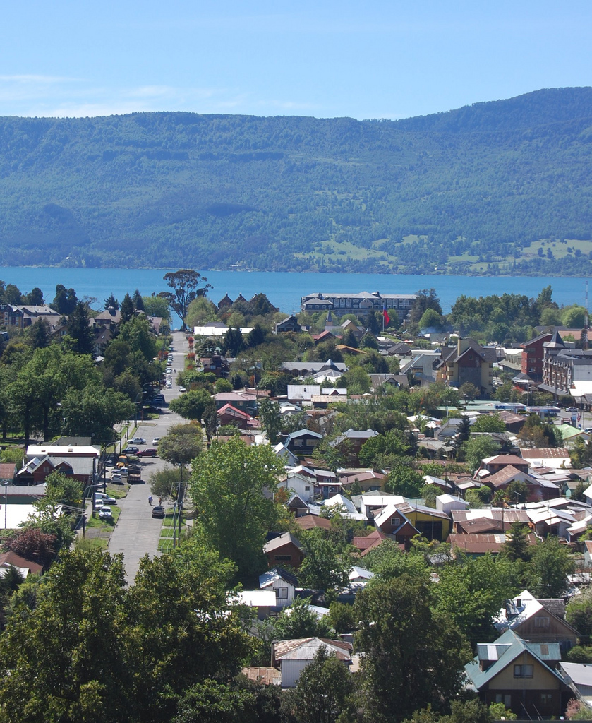 Vista desde el mirador (cementerio)